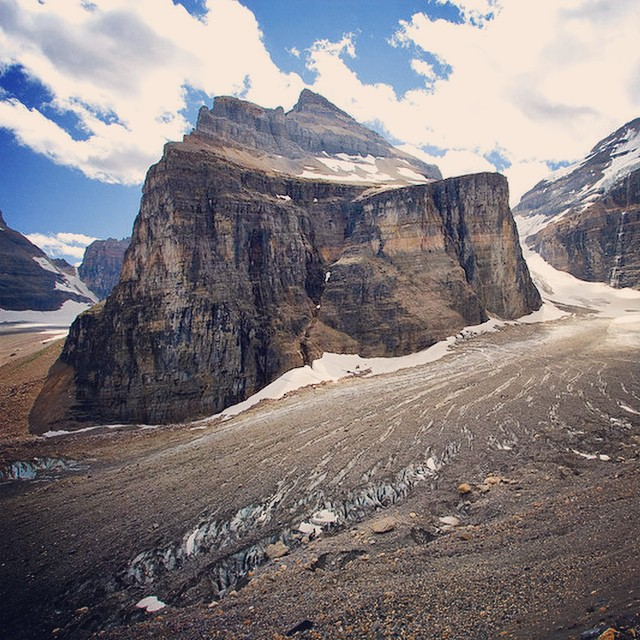 Banff